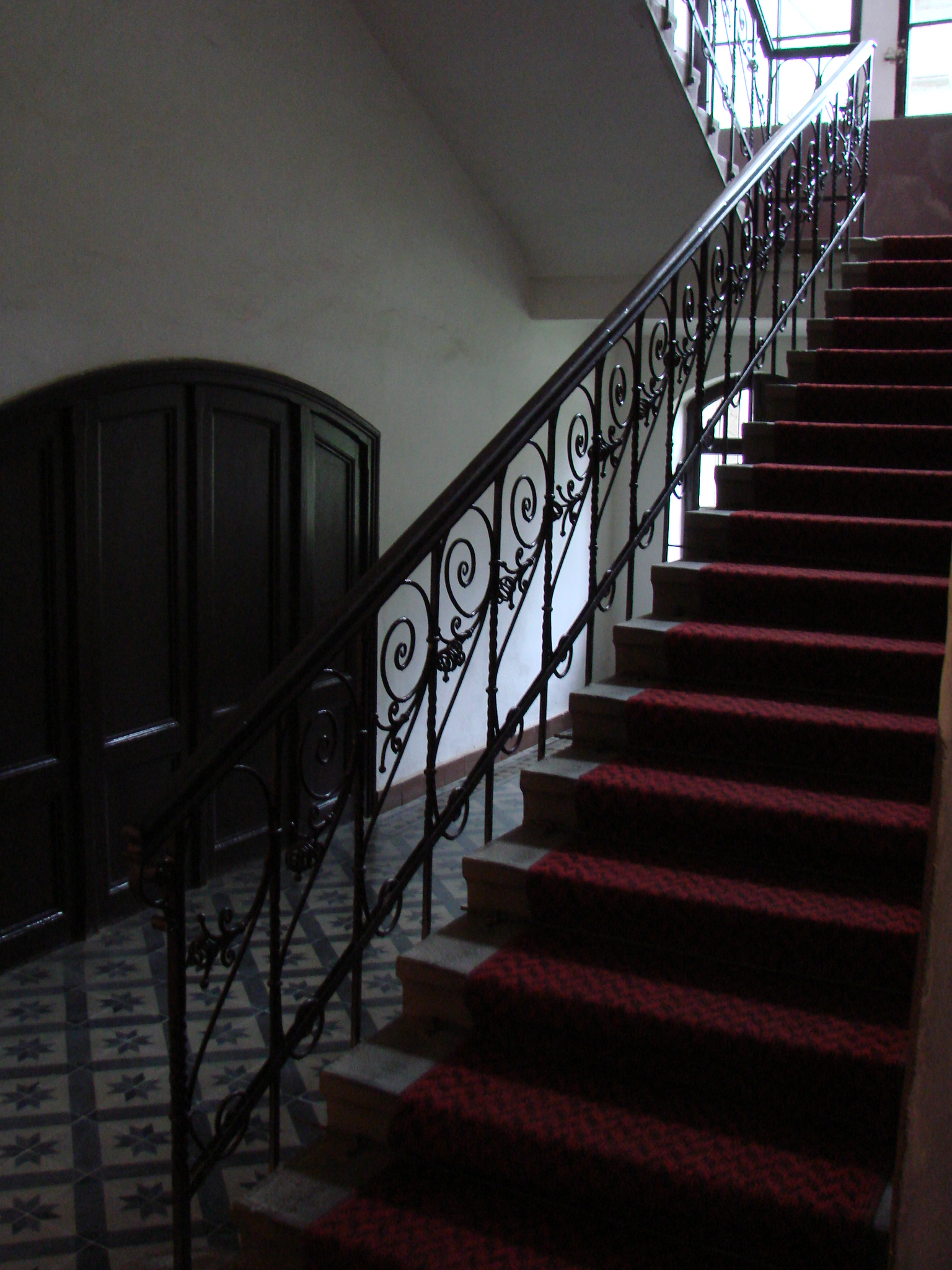 Старі сходи у палаці